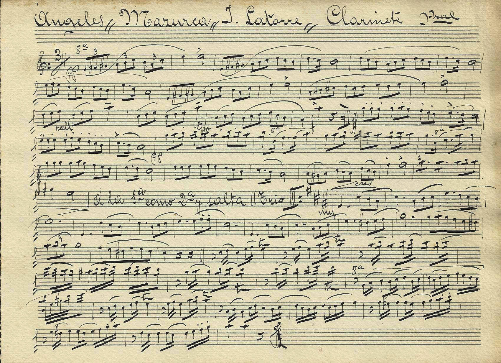 Masurca -dansa polonesa-. Ritme ternari (3/4) Data del document: 19-02-1933. Títols: Angelita Ramos i Ángeles. Aquest document s'ha publicat en: HERRERO I PIQUERES, Joan Francesc: Alginet, 125 anys amb la Societat Artística Musical, edita Ajuntament d'Alginet, any 2019. ISBN 978-84-09-13898-2 Dipòsit Legal: V-2994-2019. Pàgina 149.